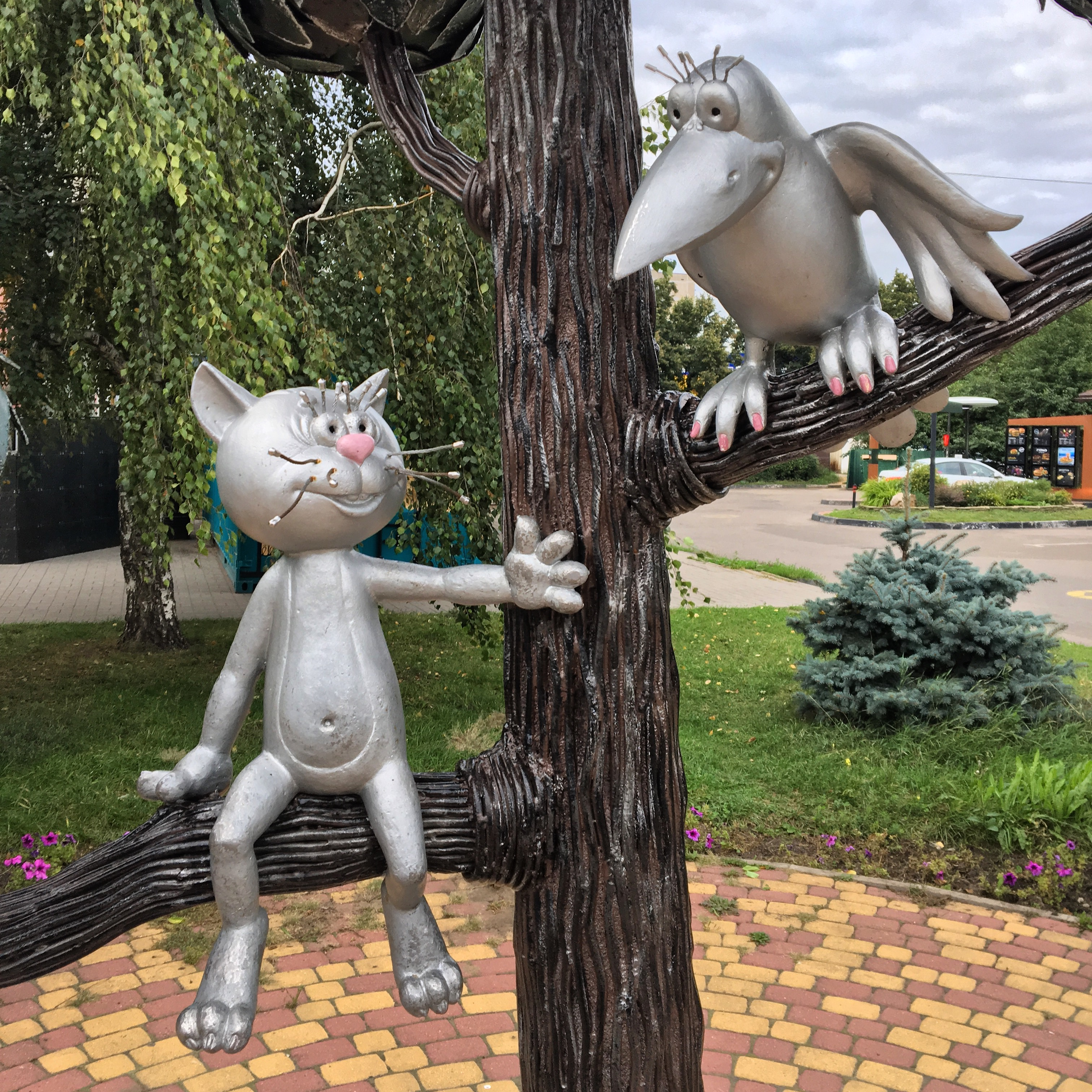 Памятник герою мультфильма «Котенок с улицы Лизюкова»: ул. Генерала Лизюкова, 4, Воронеж, Воронежская область